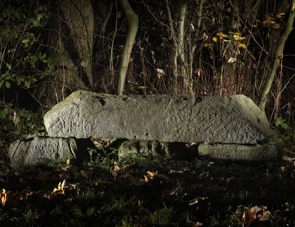 Foto: Nationalmuseet ved Roberto Fortuna